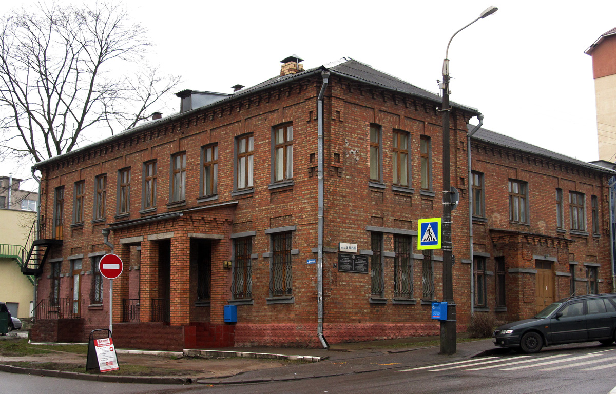 Мінск. Вуліца Караля, 9 / вуліца Шорная, 14